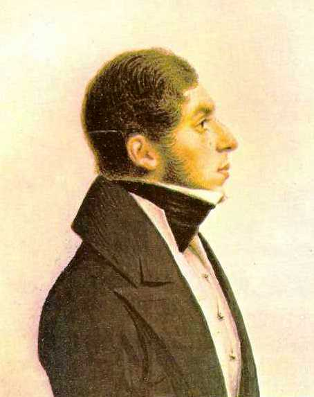 José Joaquín Prieto Vial (n. Concepción; 27 de agosto de 1786 - f. Santiago; 22 de noviembre de 1854), político y militar chileno. Fue Presidente de la República en el período 1831-1836, siendo reelegido para el periodo inmediatamente siguiente entre 1836 y 1841.